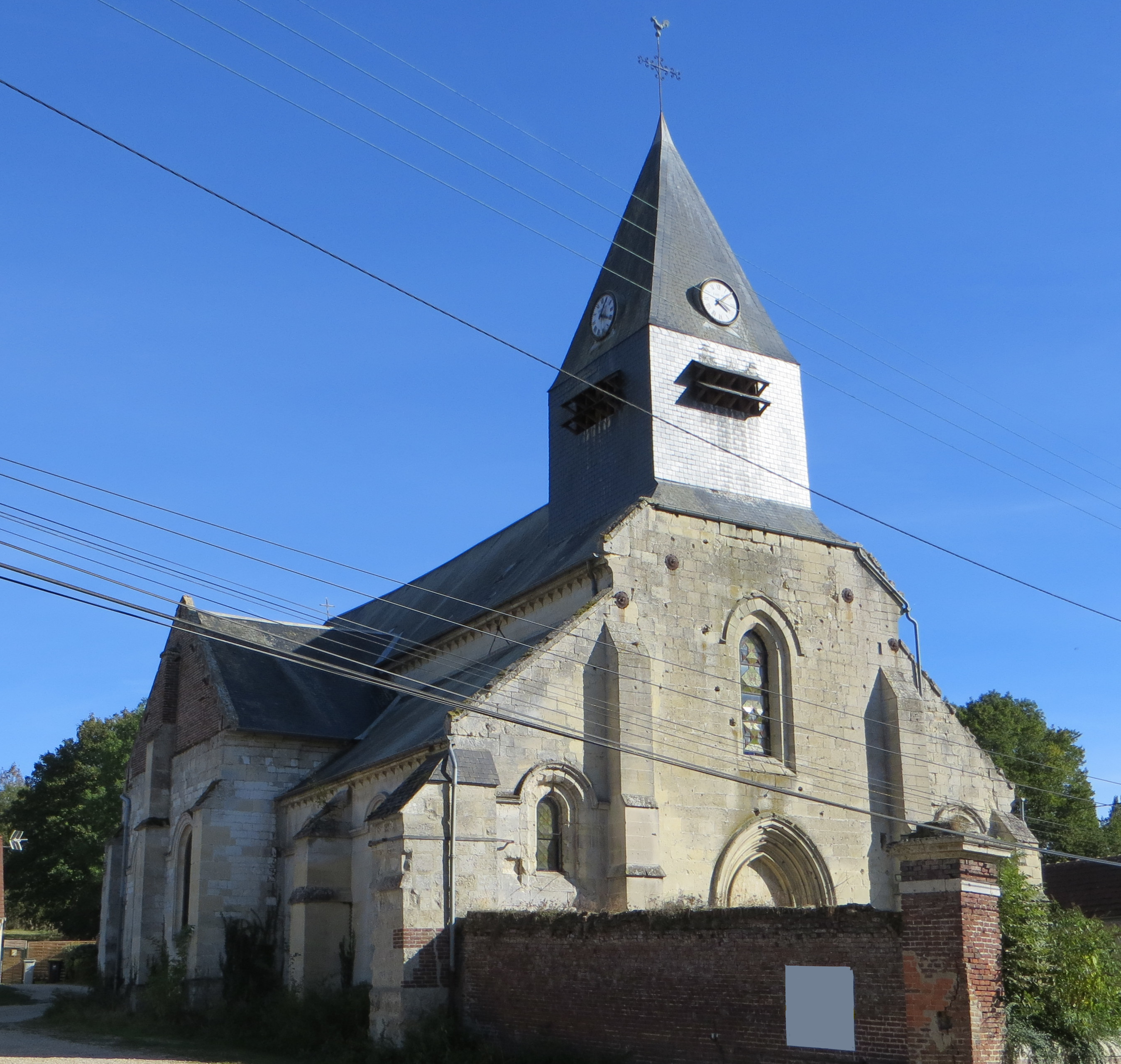 Vue générale de l'église